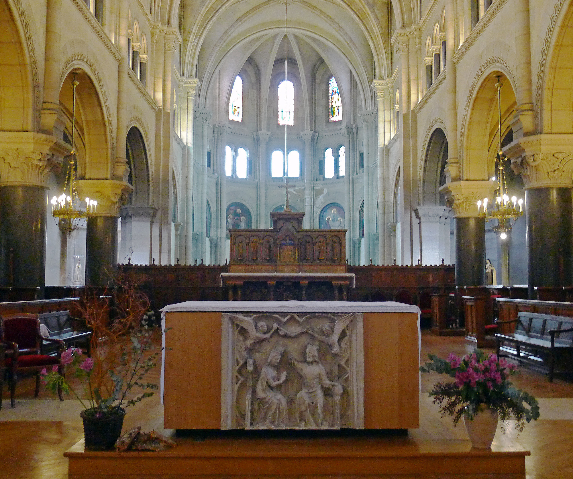 Église Saint-Joseph-des-Nations (autel) - Paris XI